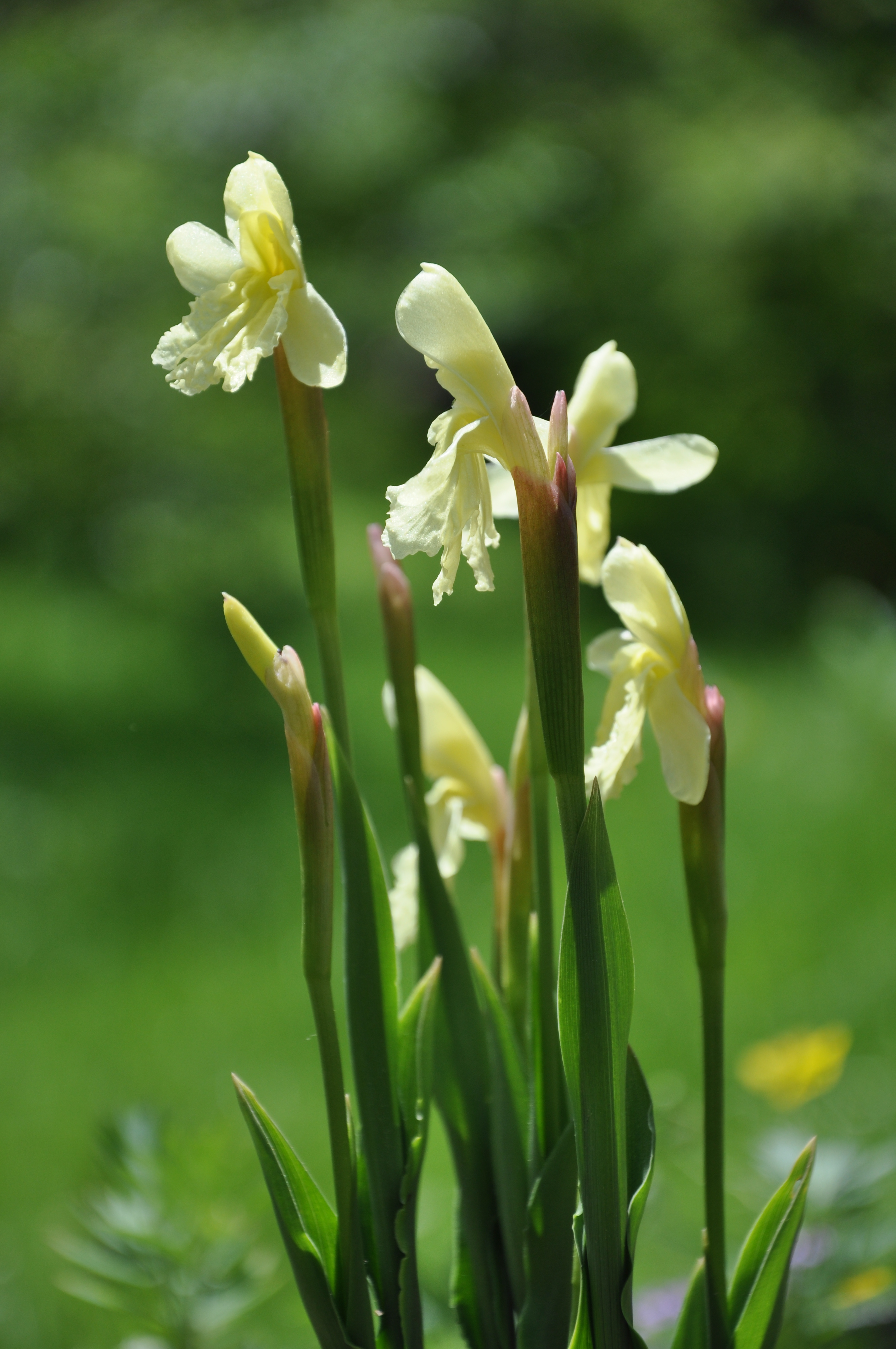 Roscoea cautleoides Gagnep.